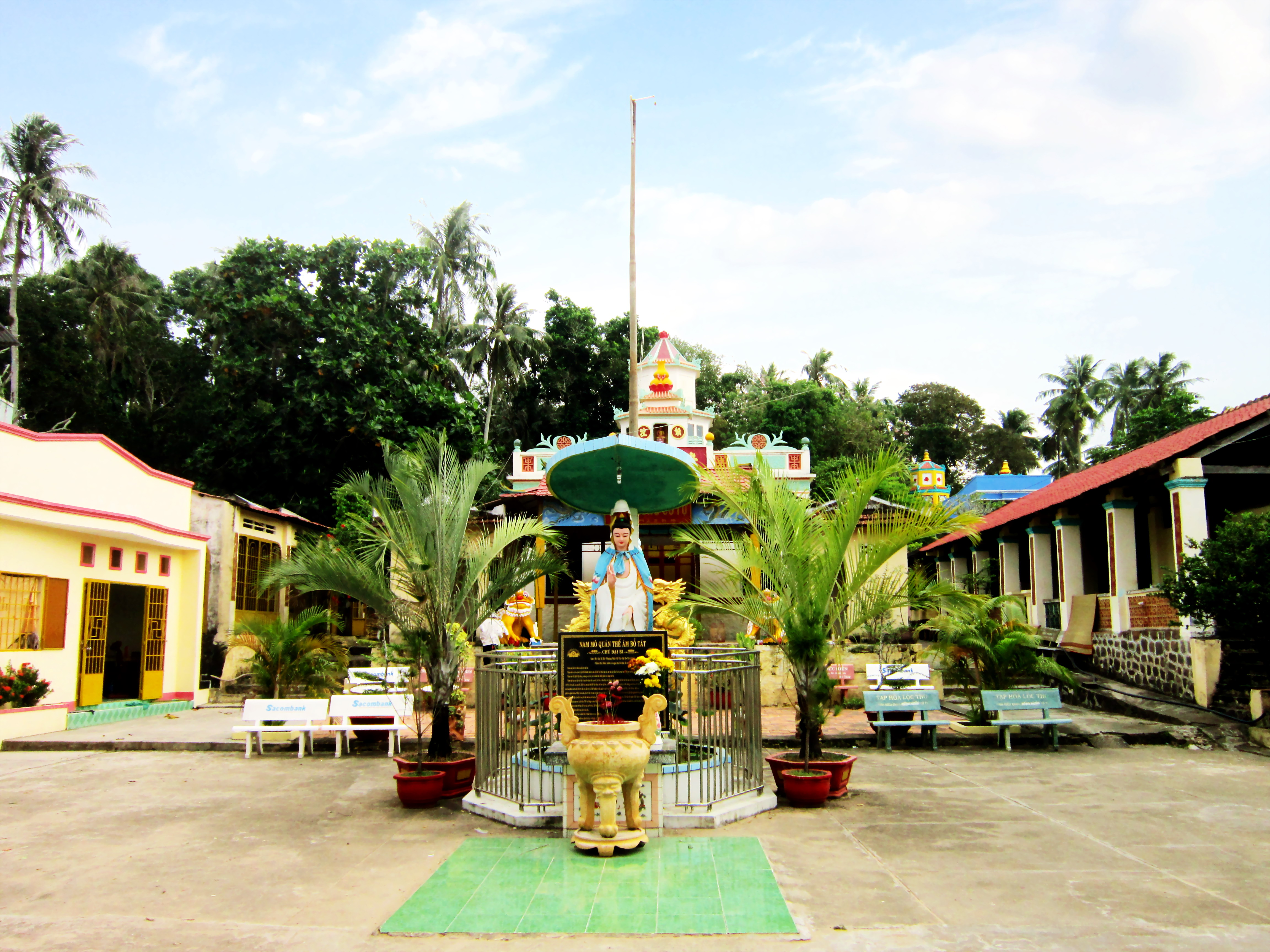 Chùa cổ Sùng Hưng (Sùng Hưng Cổ Tự) ở thị trấn Dương Đông, huyện Phú Quốc, tỉnh Kiên Giang, Việt Nam. Đây là một ngôi chùa lâu đời nhất ở huyện đảo này.